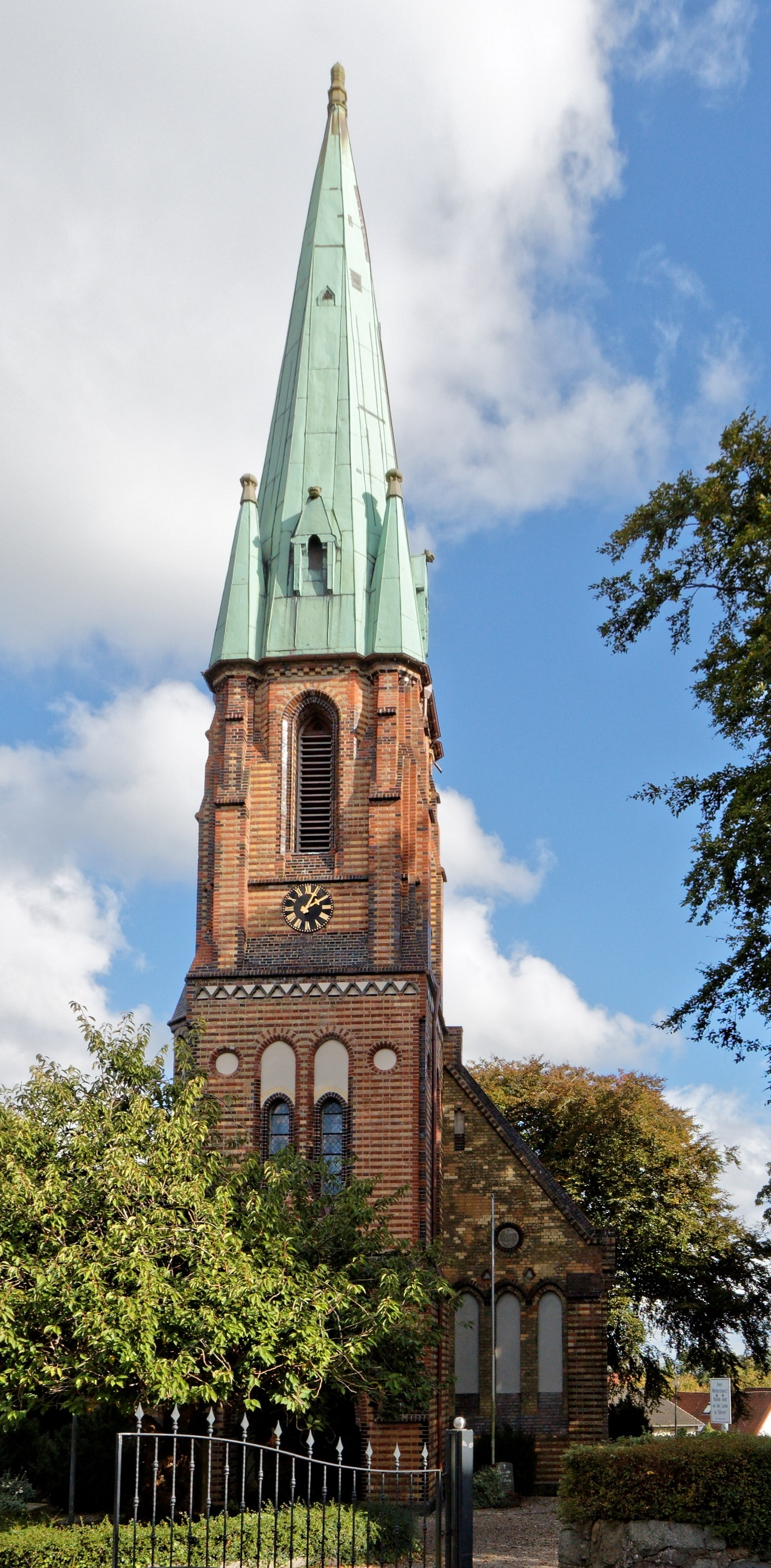 Schleswig-Friedrichsberg, ev.-luth. Dreifaltigkeitskirche